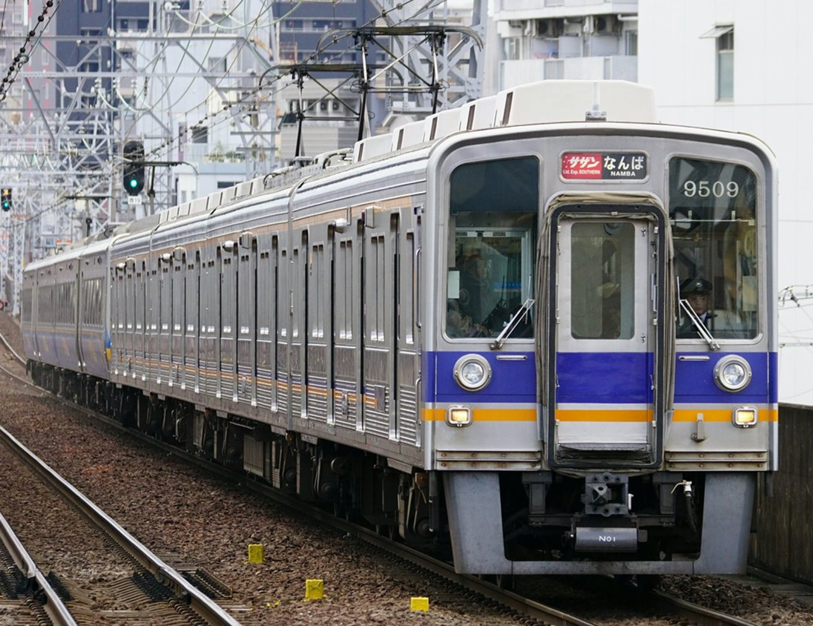 南海9000系9509F 南海特急「サザン」なんば行き